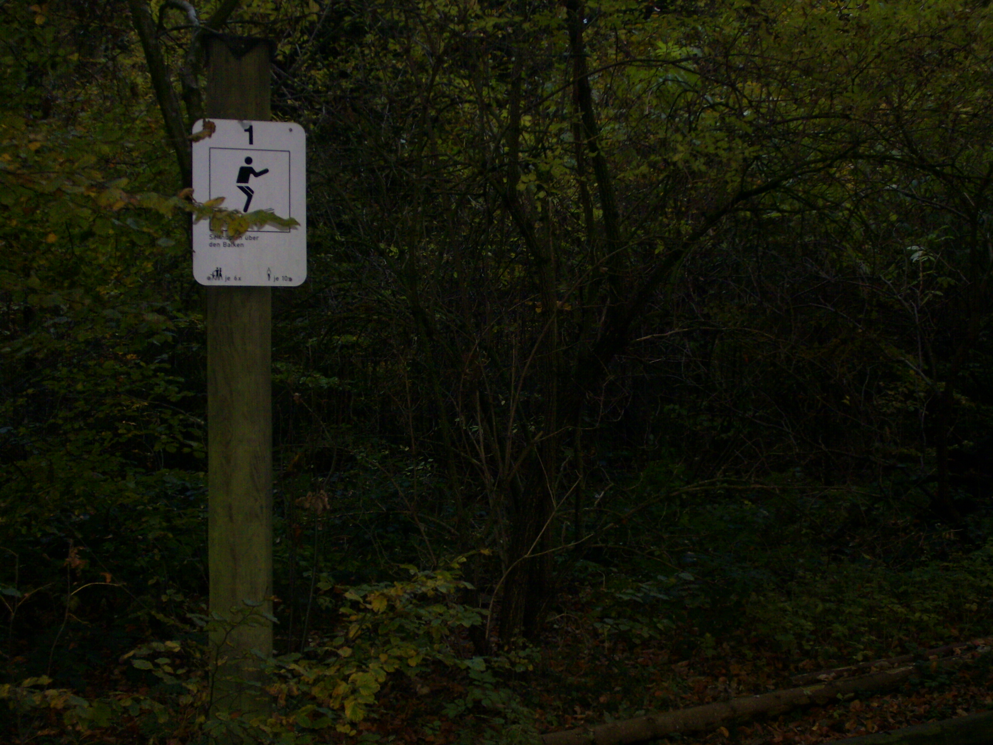 trimmdich-pfad lindewitter wald